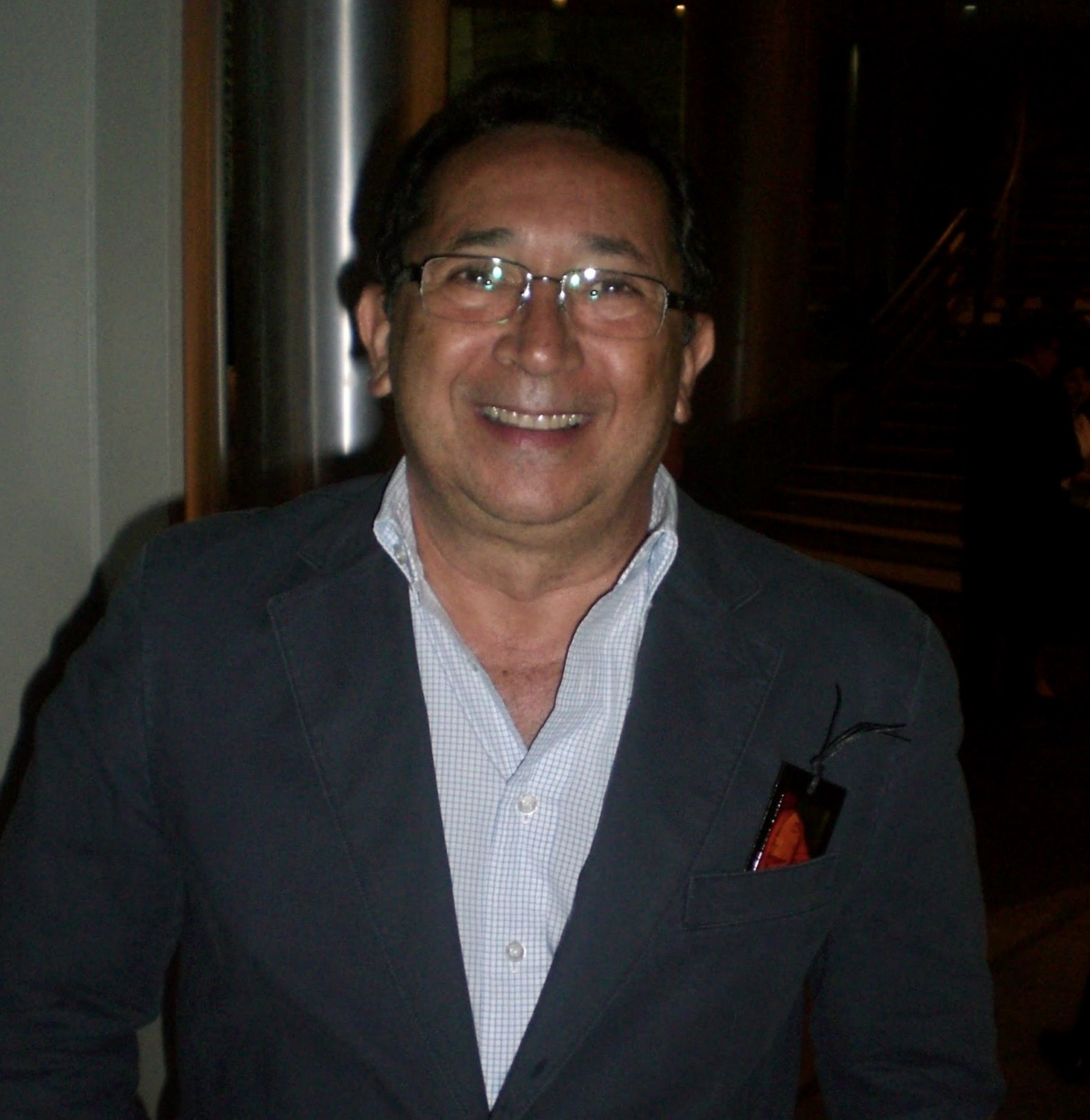 Francisco Suniaga, escritor venezolano.